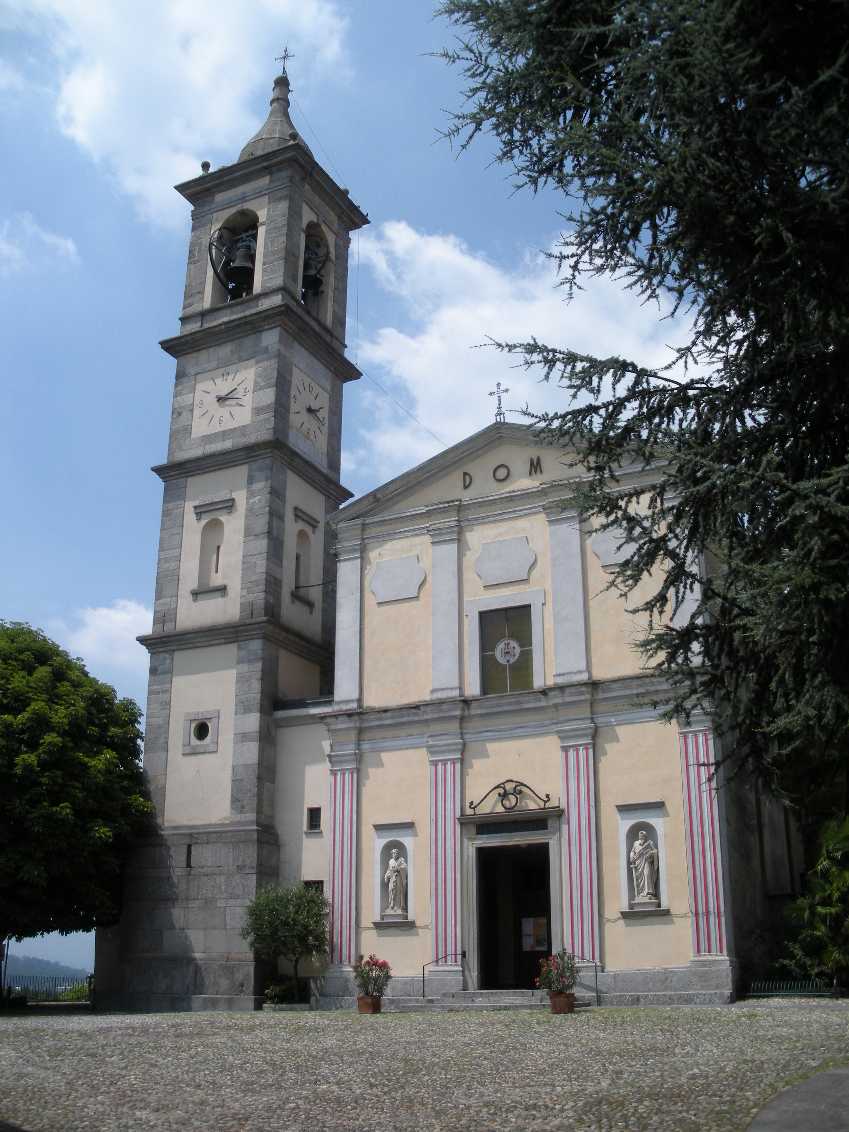 Foto della facciata della chiesa di Inarzo